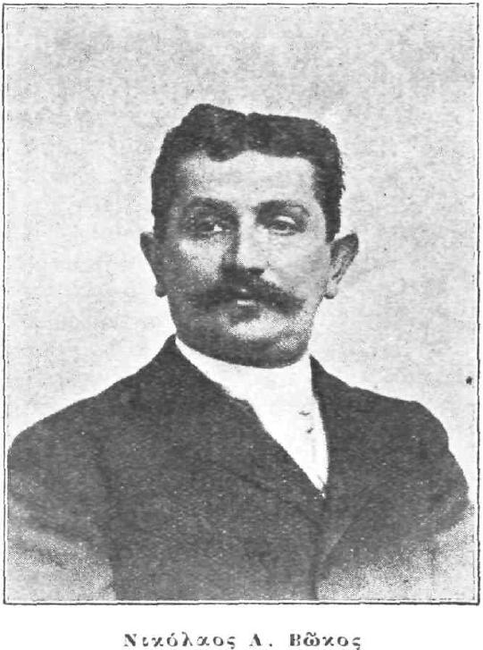 Griechischer Maler, 19. Jahrhundert